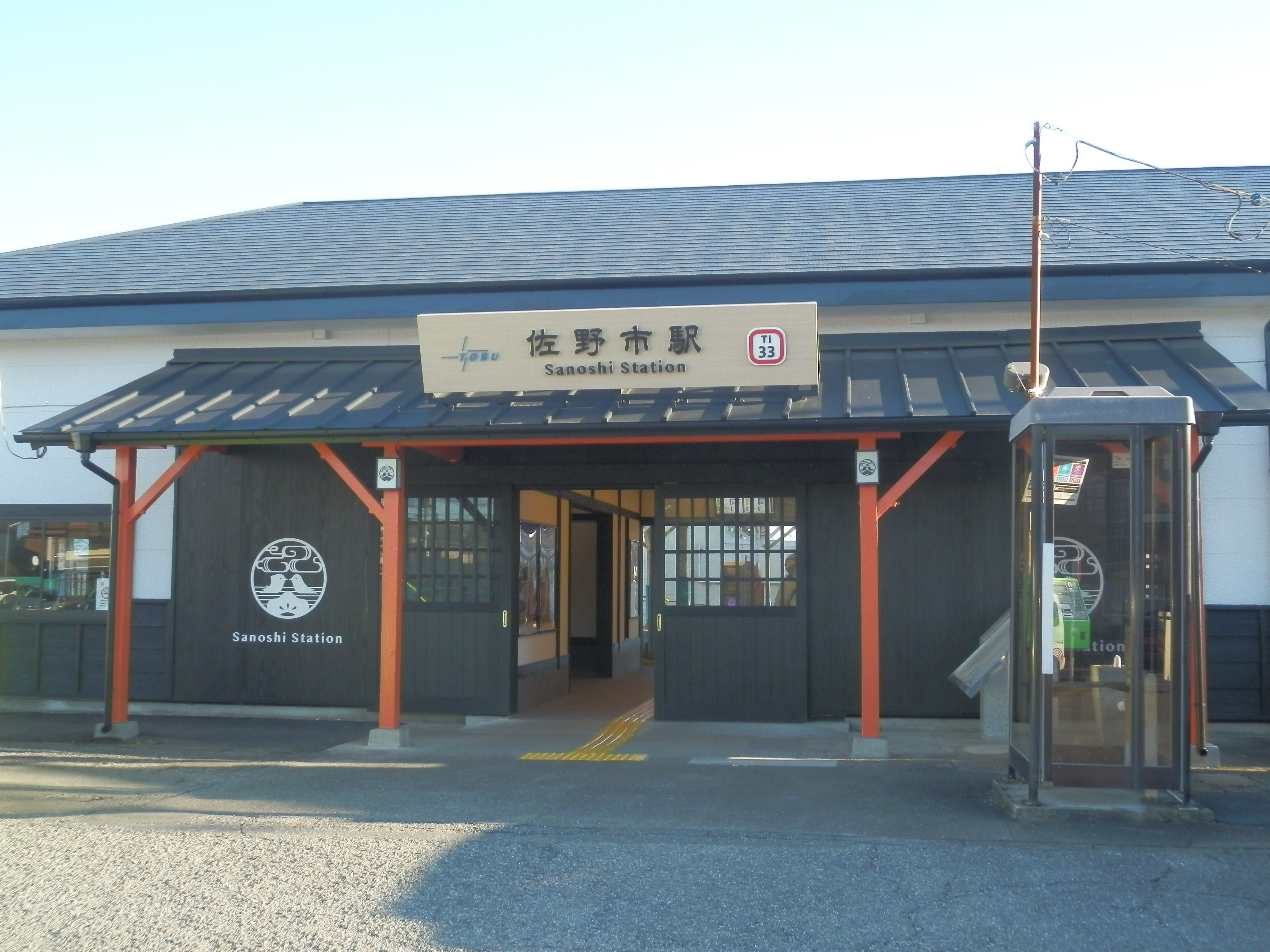 佐野市駅駅舎